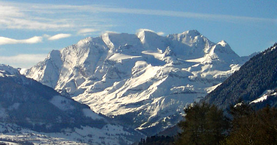 Die Blümlisalp, von Thun aus gesehen. Fotografiert von Zumbo, Public Domain